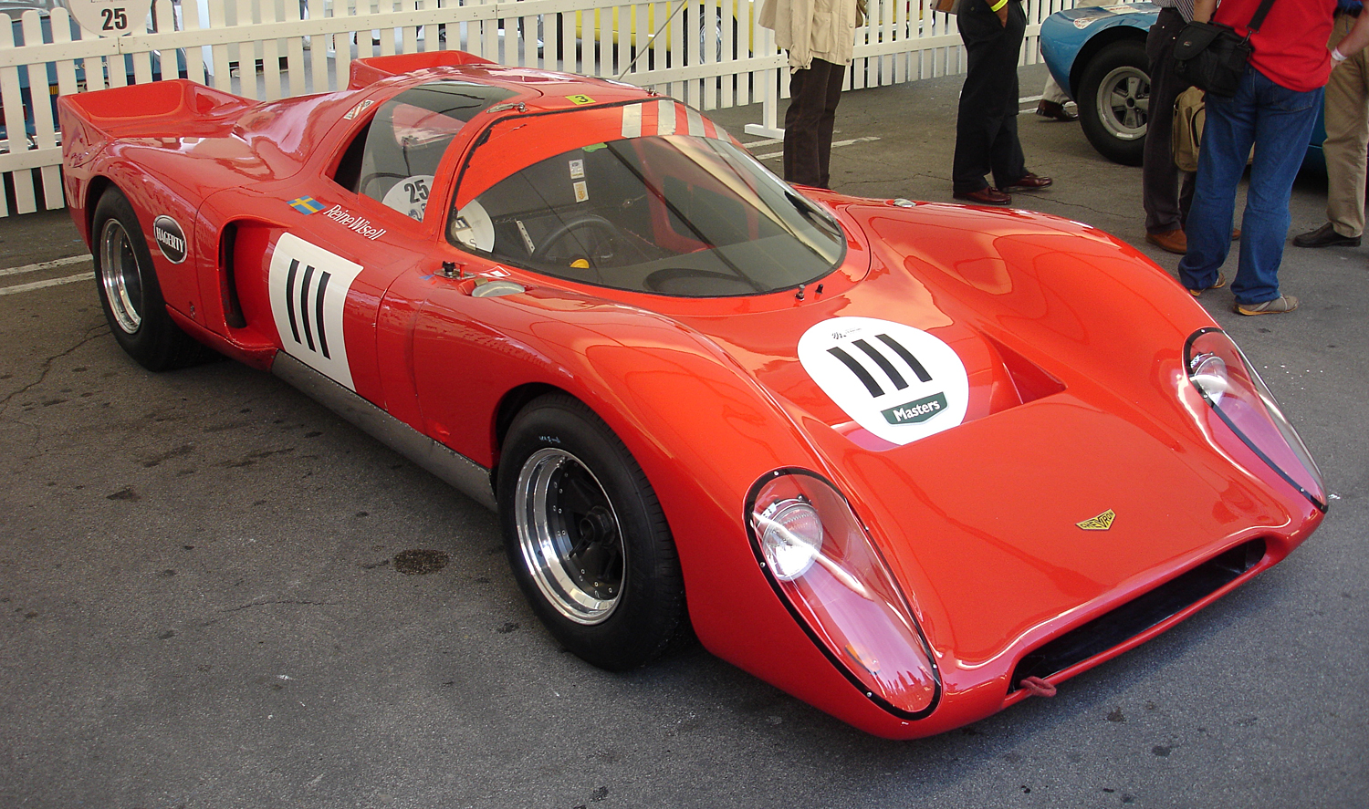 Chevron B16 exposat al festival Martini Legends (commemoració del 75 aniversari del Circuit de Montjuïc)